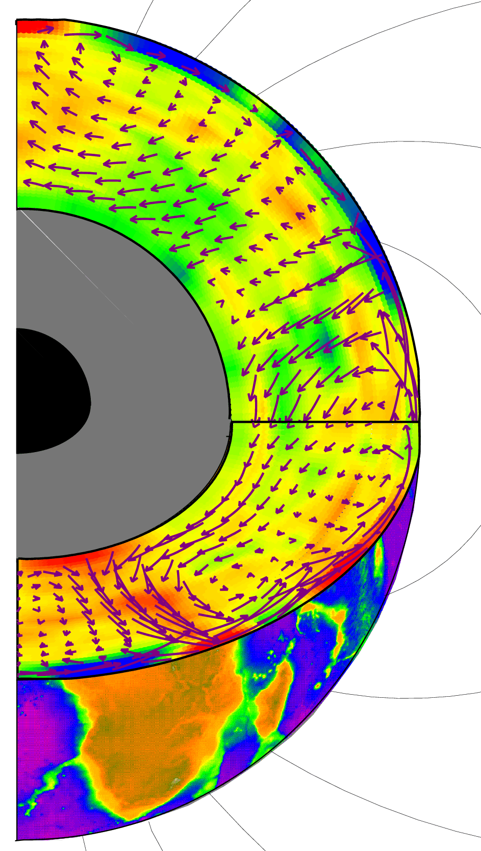 Modell von Mantelkonvektion von B. Steinberger, basierend auf seismischer Tomographie von S. Grand Quelle: B. Steinberger, Inst. f. Meteorologie und Geophysik , Uni Frankfurt Fotograf/Zeichner: B. Steinberger Datum: 1999 andere Versionen: ...